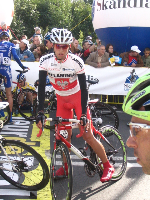 Czwarty etap 64. Tour de Pologne: Chojnice - Poznań